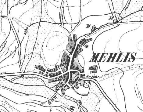 Urmesstischblatt zur Ortslage Mehlis bei Suhl